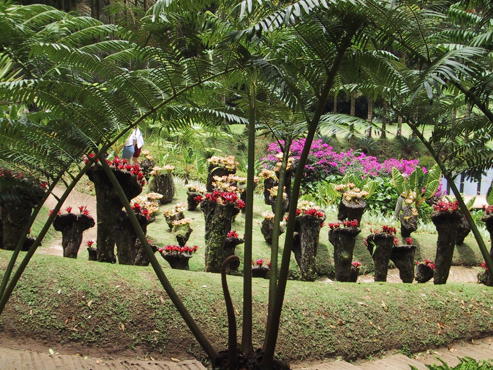 Les jardins de Balata en Martinique